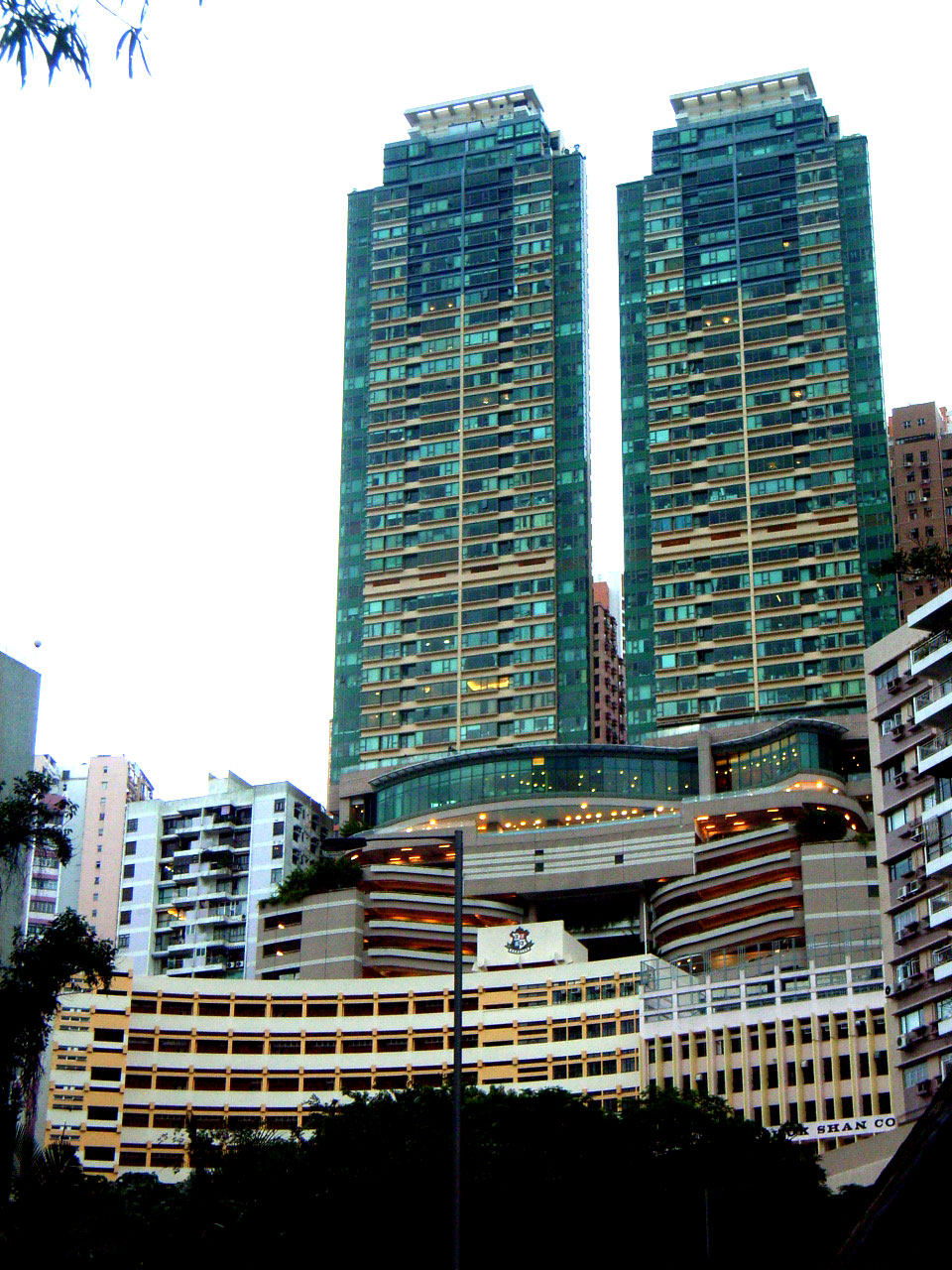 中文（香港）: 北角半山區寶馬山、張祝珊英文中學及鄰近zh:住宅區